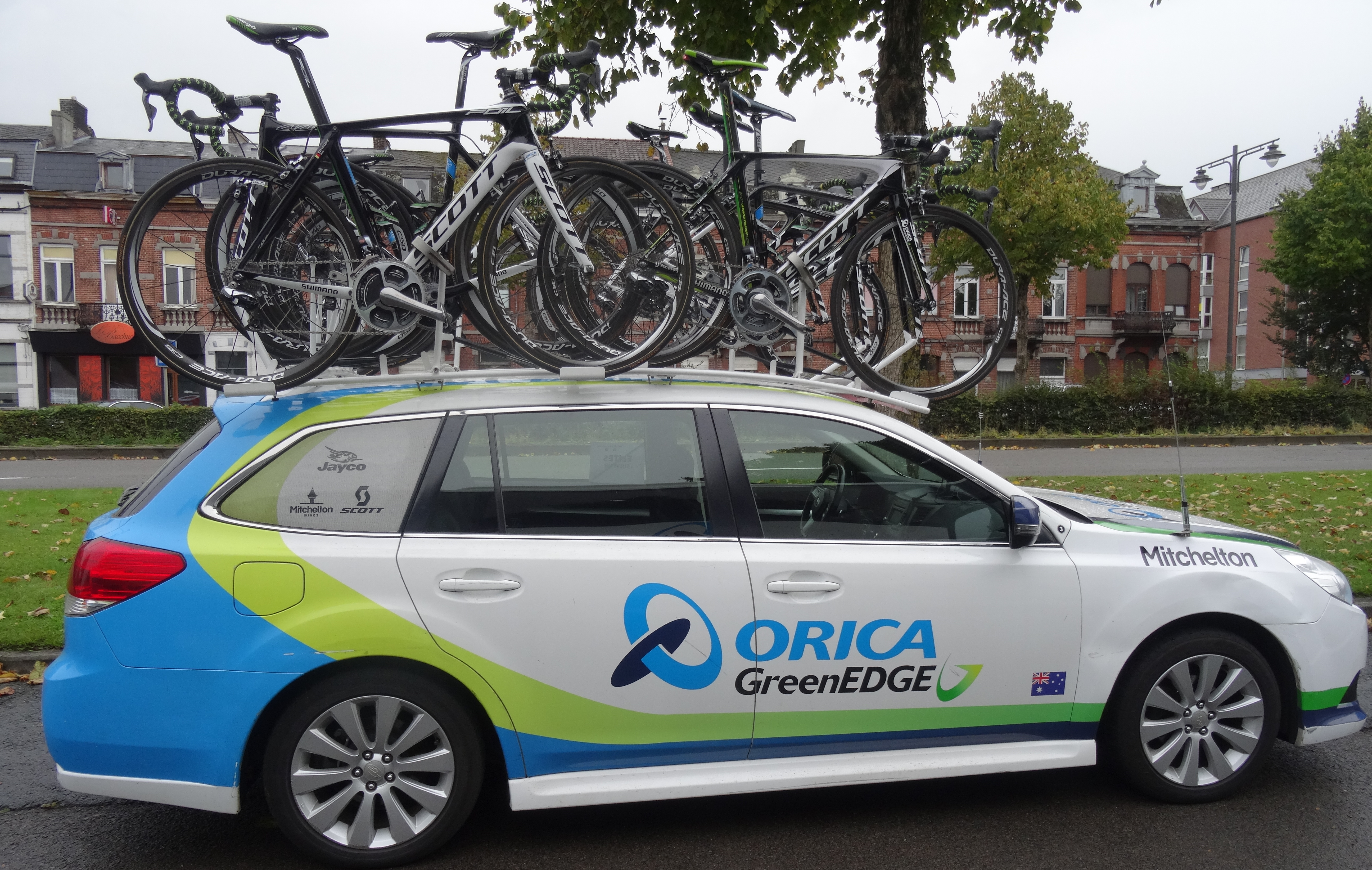 Reportage photographique réalisé le dimanche 5 octobre à l'occasion du départ de la quatrième étape de l'Eurométropole Tour 2014 à Mons, Belgique.